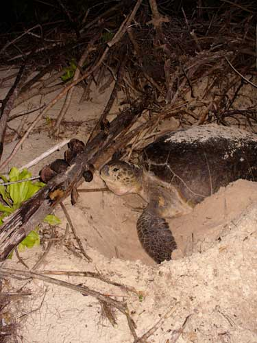 tortue verte